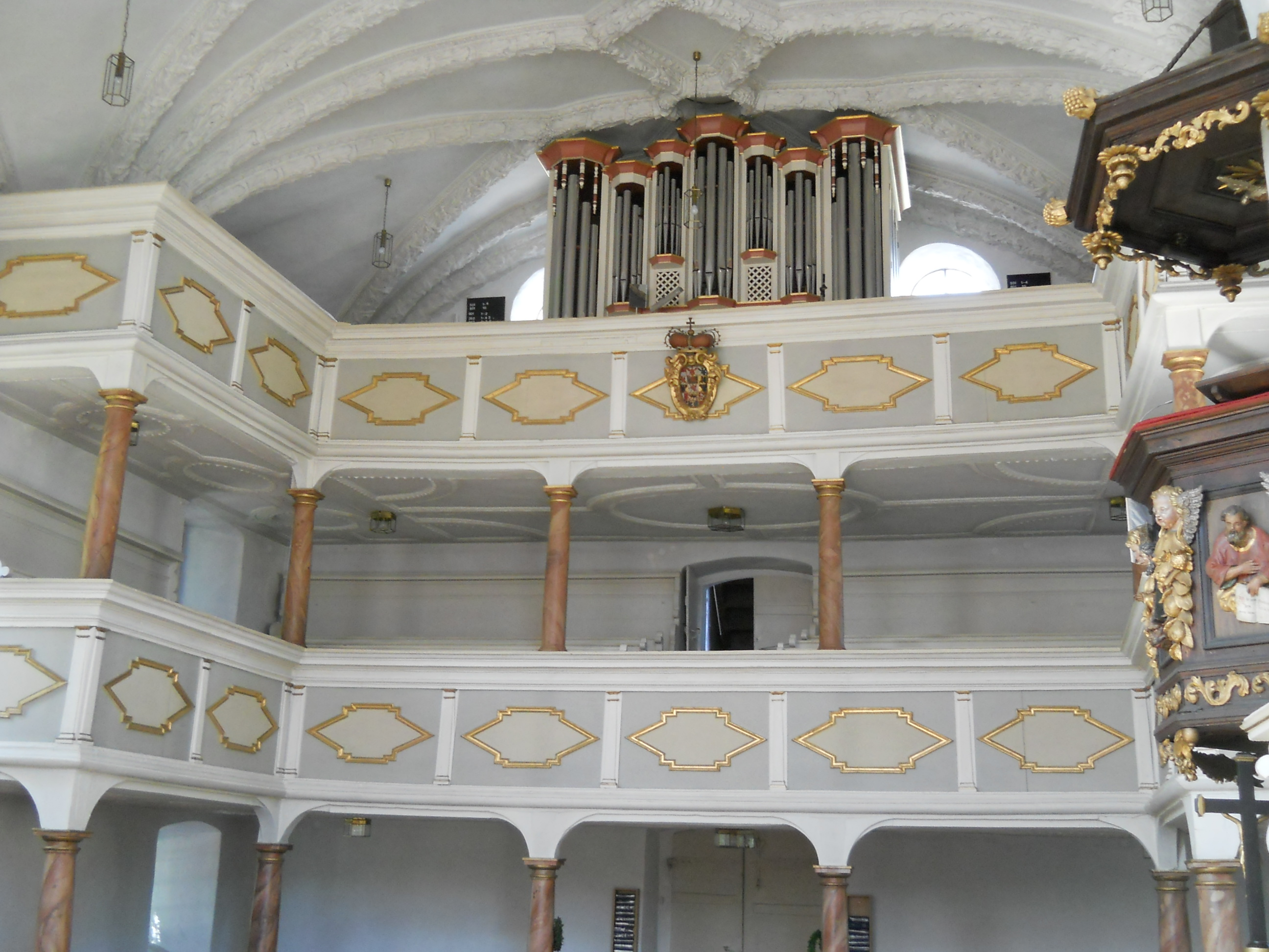 Laubenzedel, Ortsteil von Gunzenhausen im Landkreis Weißenburg-Gunzenhausen (Bayern), Evang.-luth. Pfarrkirche St. Sixtus, Doppelemporen